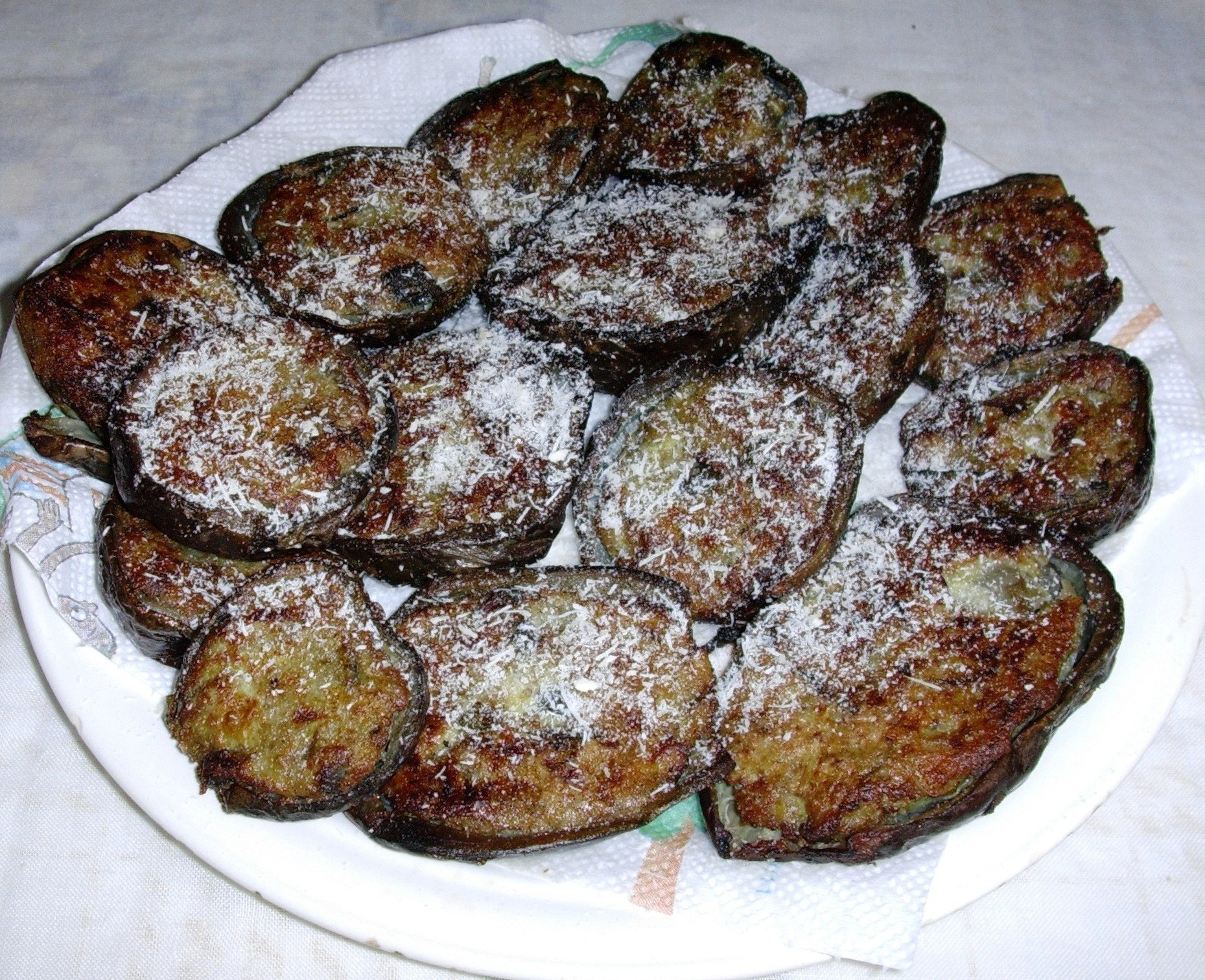 Resubida de la Wikipedia en italiano. Me habría gustado subirla mediante MediaWiki pero de verdad que es un caos, esa madre no la entiende ni Dios. Más fácil resubirla manualmente y eso he hecho.